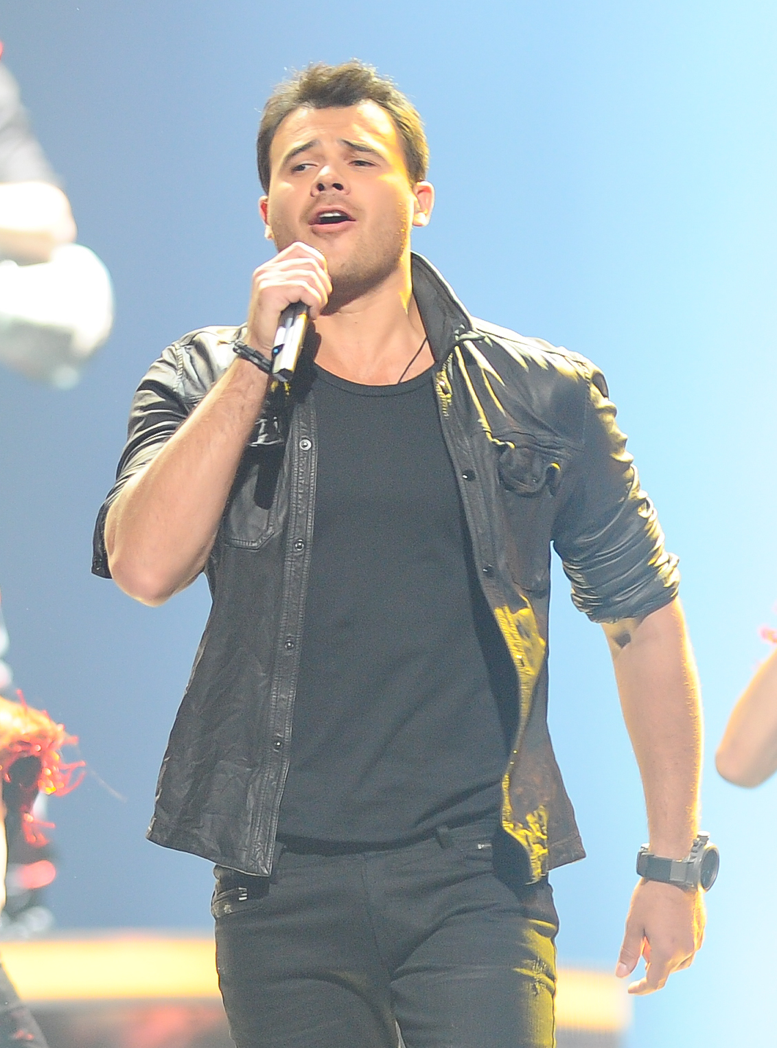 Эмин Агаларов